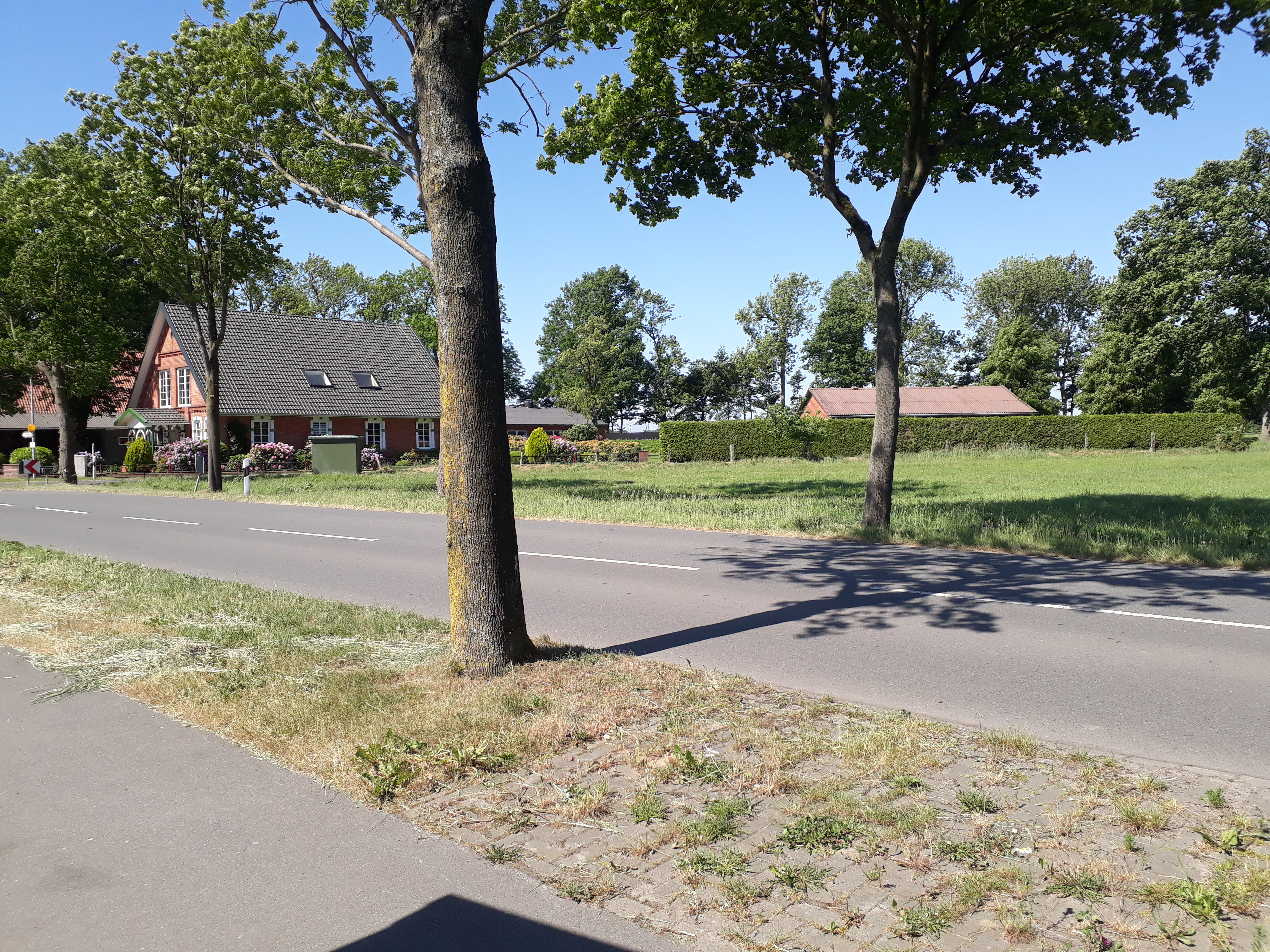 Weiler Bockholt bei Ahlerstedt.